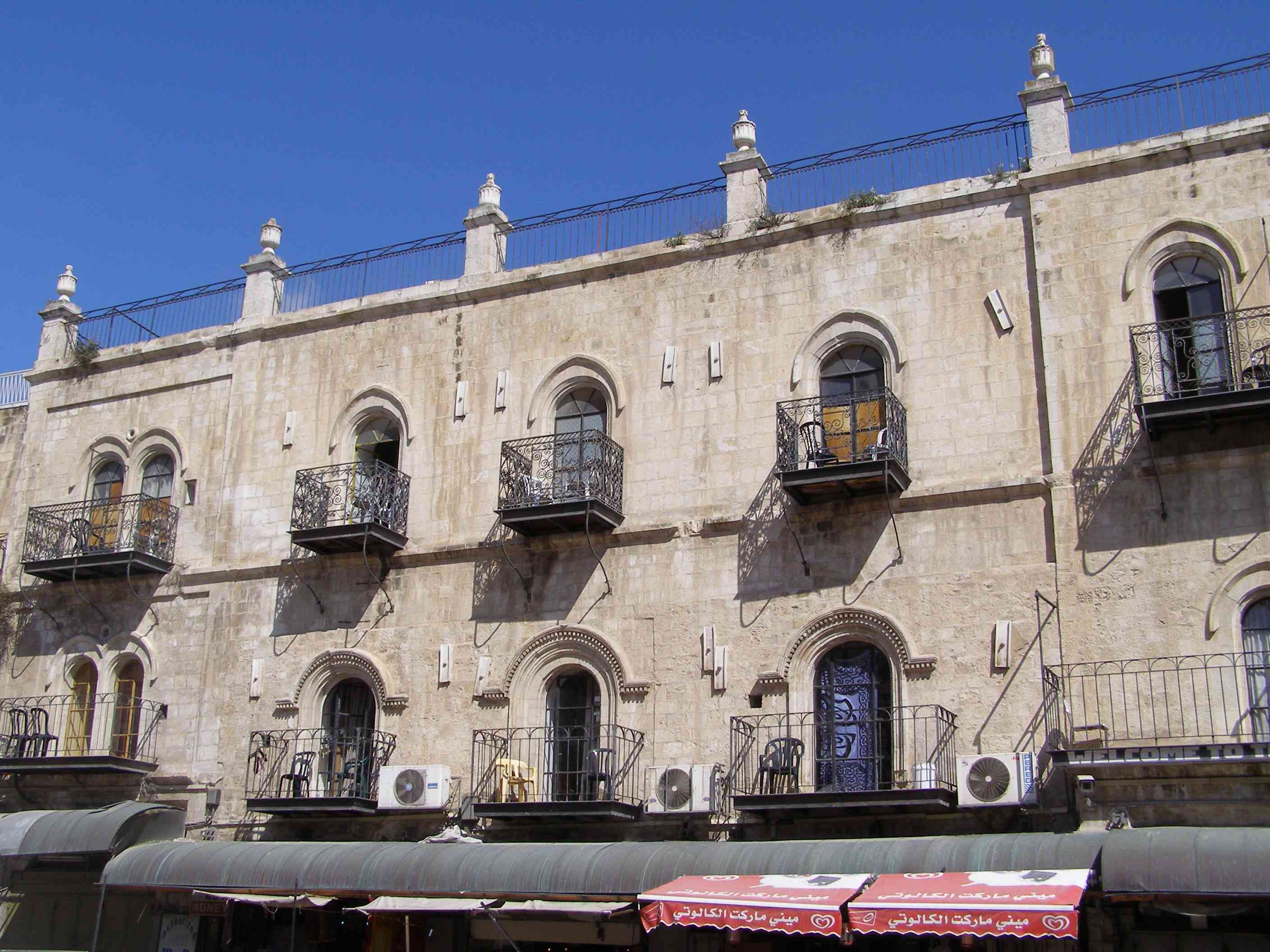 Petra hotel Jerusalem